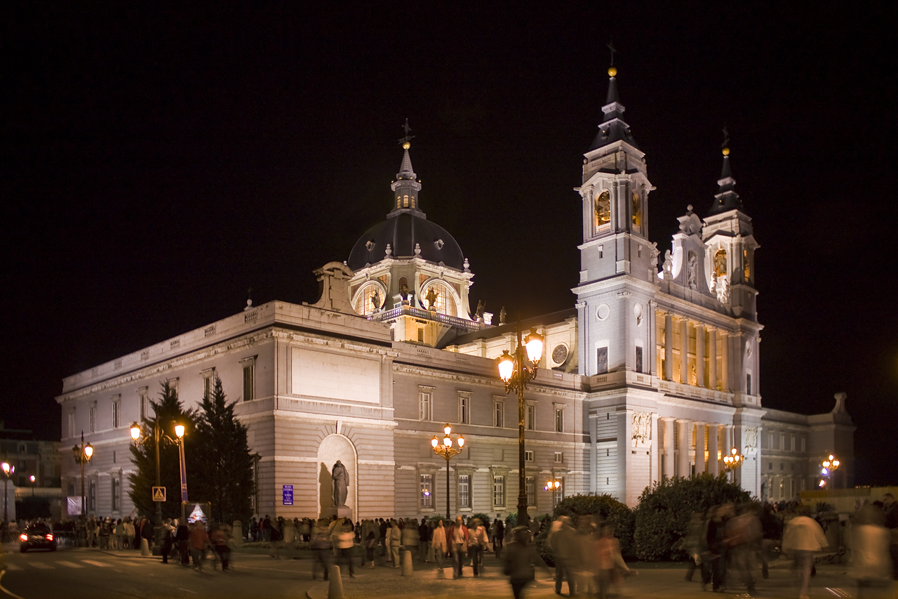 catedral de La Almudena, Madrid, España. 2008 Vista nocturna